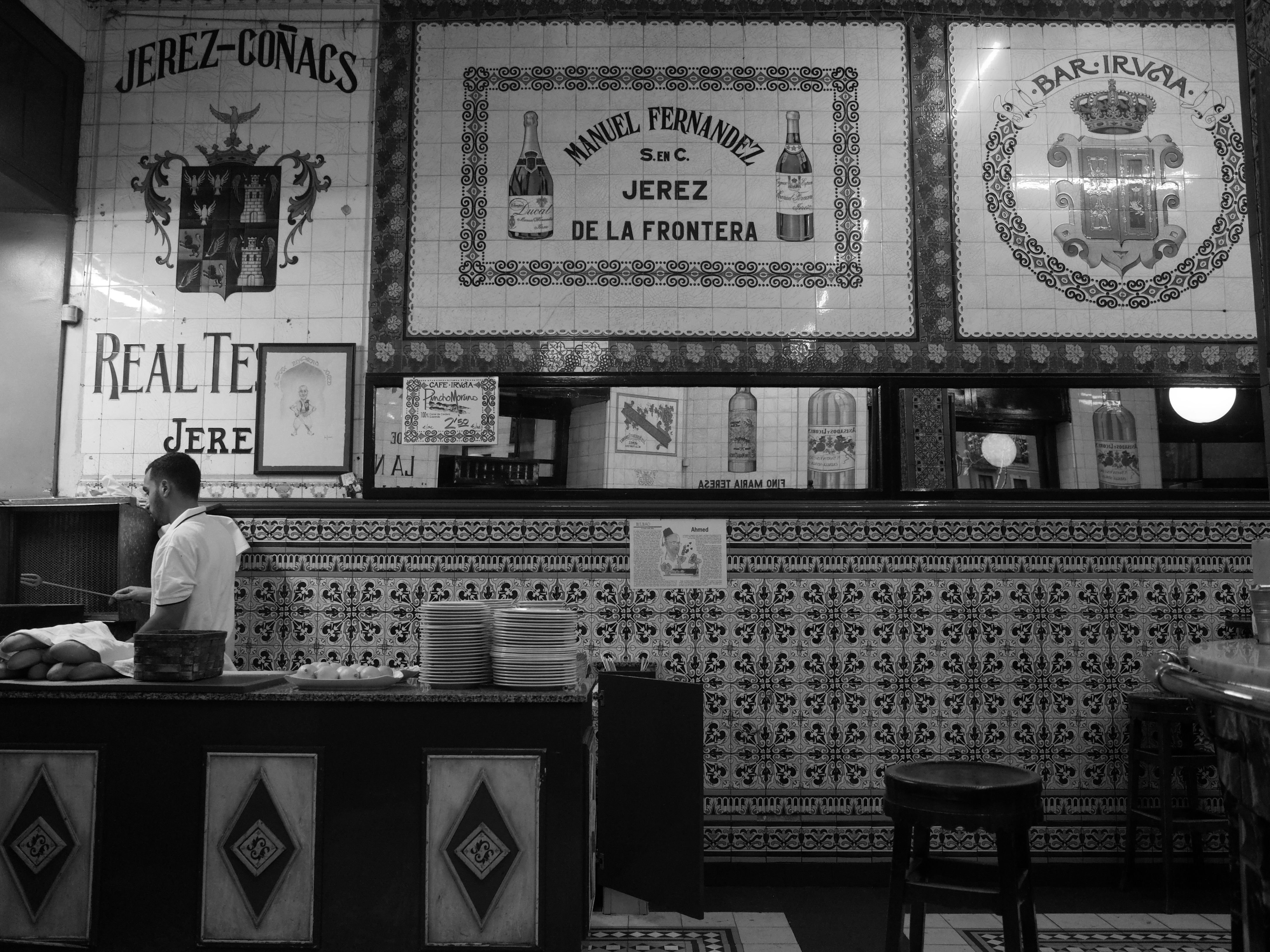 Bilbao :: Café Iruña